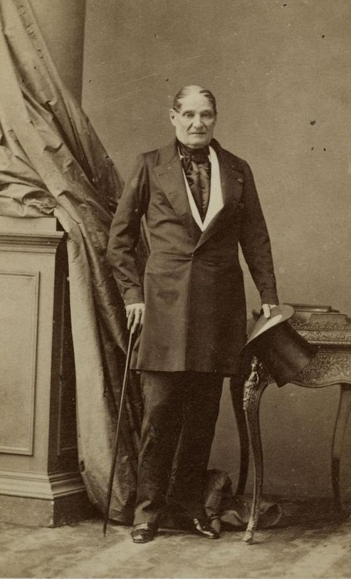 Photographie de Jerôme Bonaparte (1784-1860), le plus jeune frère de Napoléon.